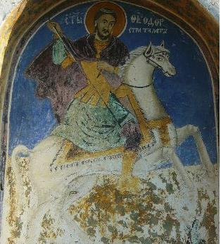 Фреска на Теодор Тирон в църквата „Свети Димитър“ в Ракитница